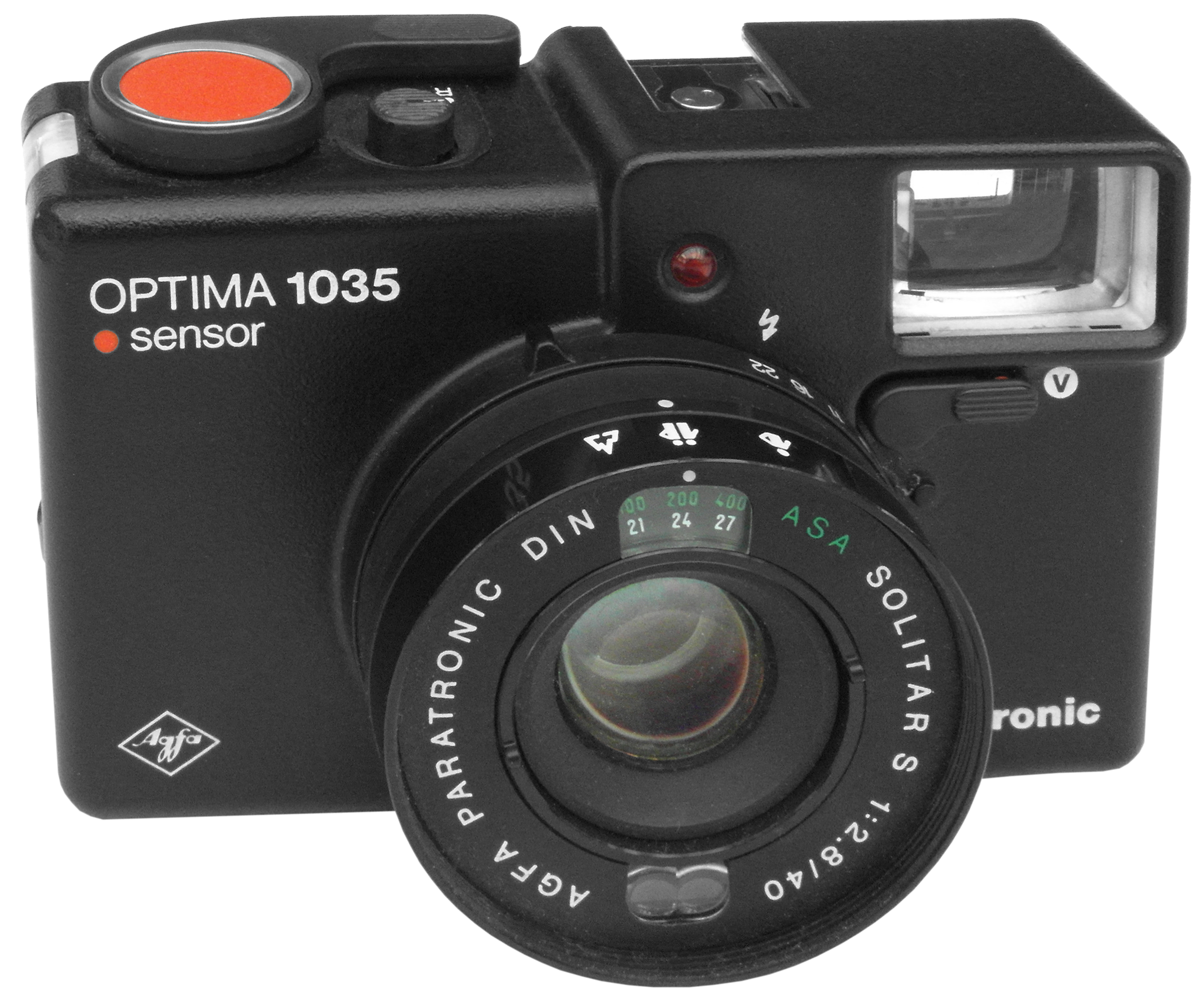 Die Agfa Optima 1035 Sensor electronic war gegenüber der 535 in drei Punkten verbessert: Das Solitar "S" war mehrfach vergütet, der Zeitenbereich ging bis 1/1000 Sekunde und sie besaß einen Selbstauslöser. Das Topmodell, die 1535 hatte zwar keinen Selbstauslöser, dafür aber einen Mischbild-Entfernungsmesser (was aber etwas von der Brillanz des Suchers nahm). Das preisgünstigste Modell dieser Reihe war übrigens die 335. Mit den Modellen Optima Sensor electronic und Optima sensor electronic flash beendete Agfa diese originelle Kameraserie.